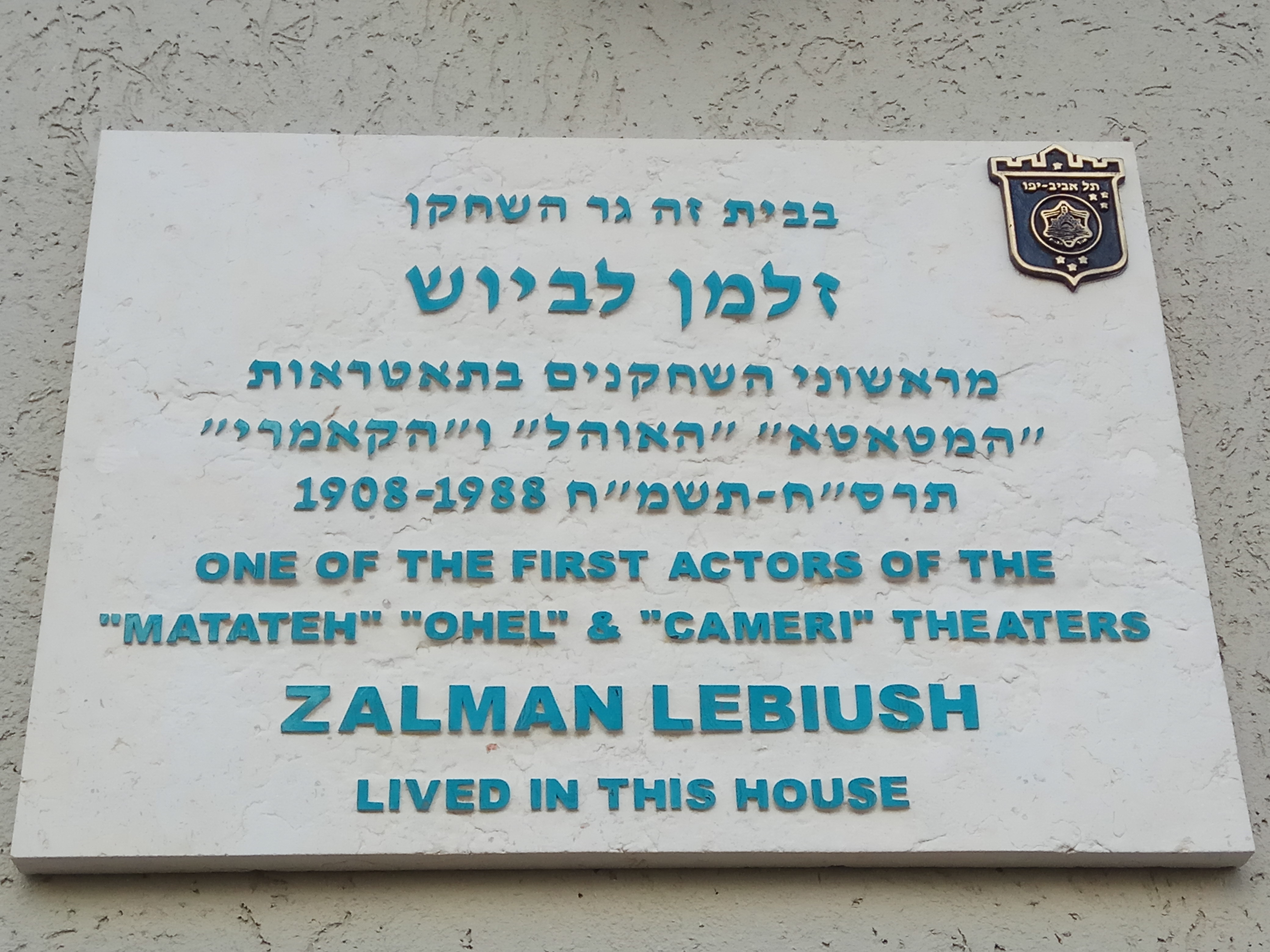 לוחית זיכרון לזלמן לביוש ברחוב השופטים 2 בתל אביב